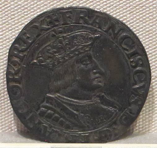 Palazzo Massimo alle Terme